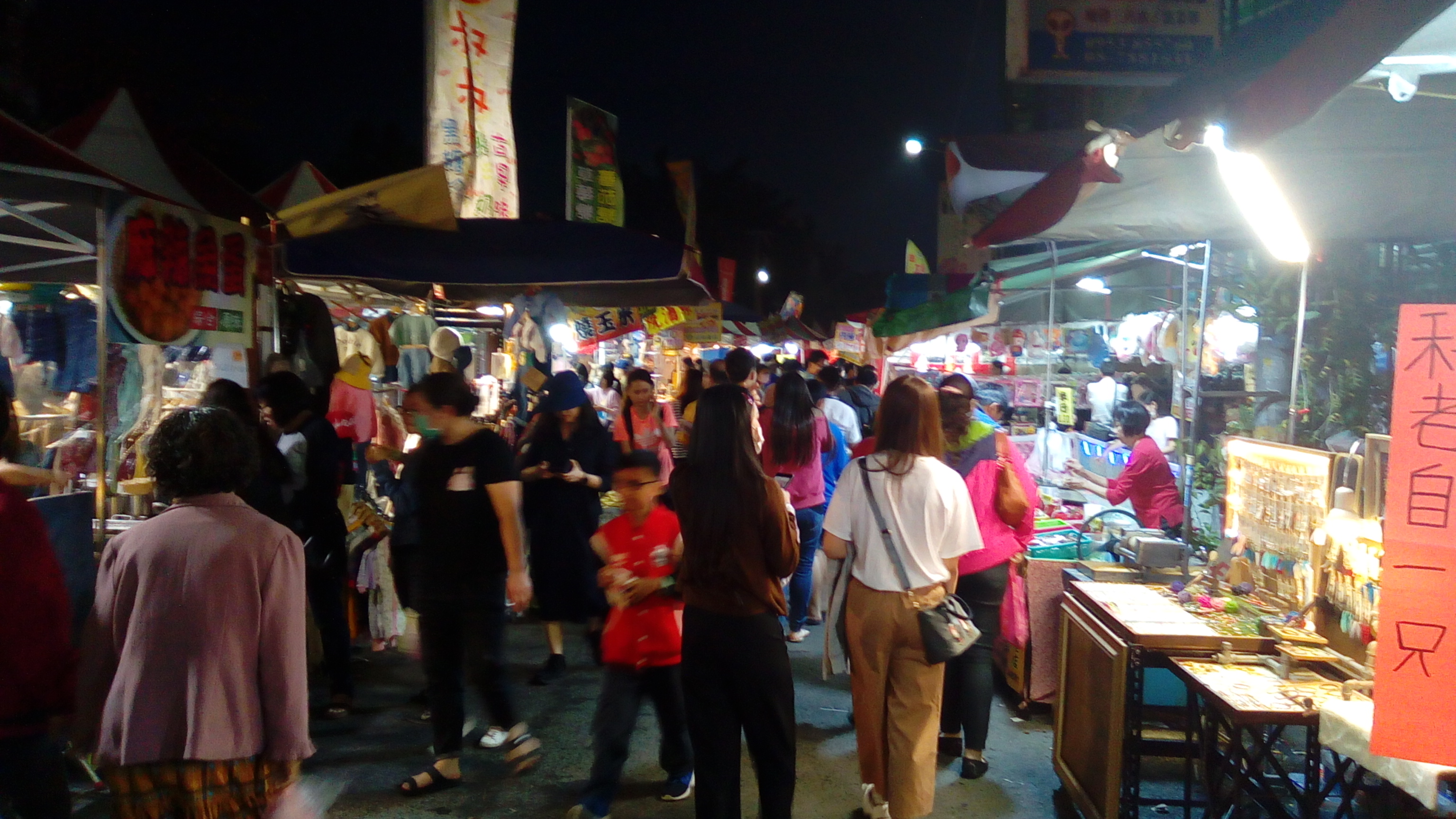 此圖於初二 攝於潮州鎮清水南路